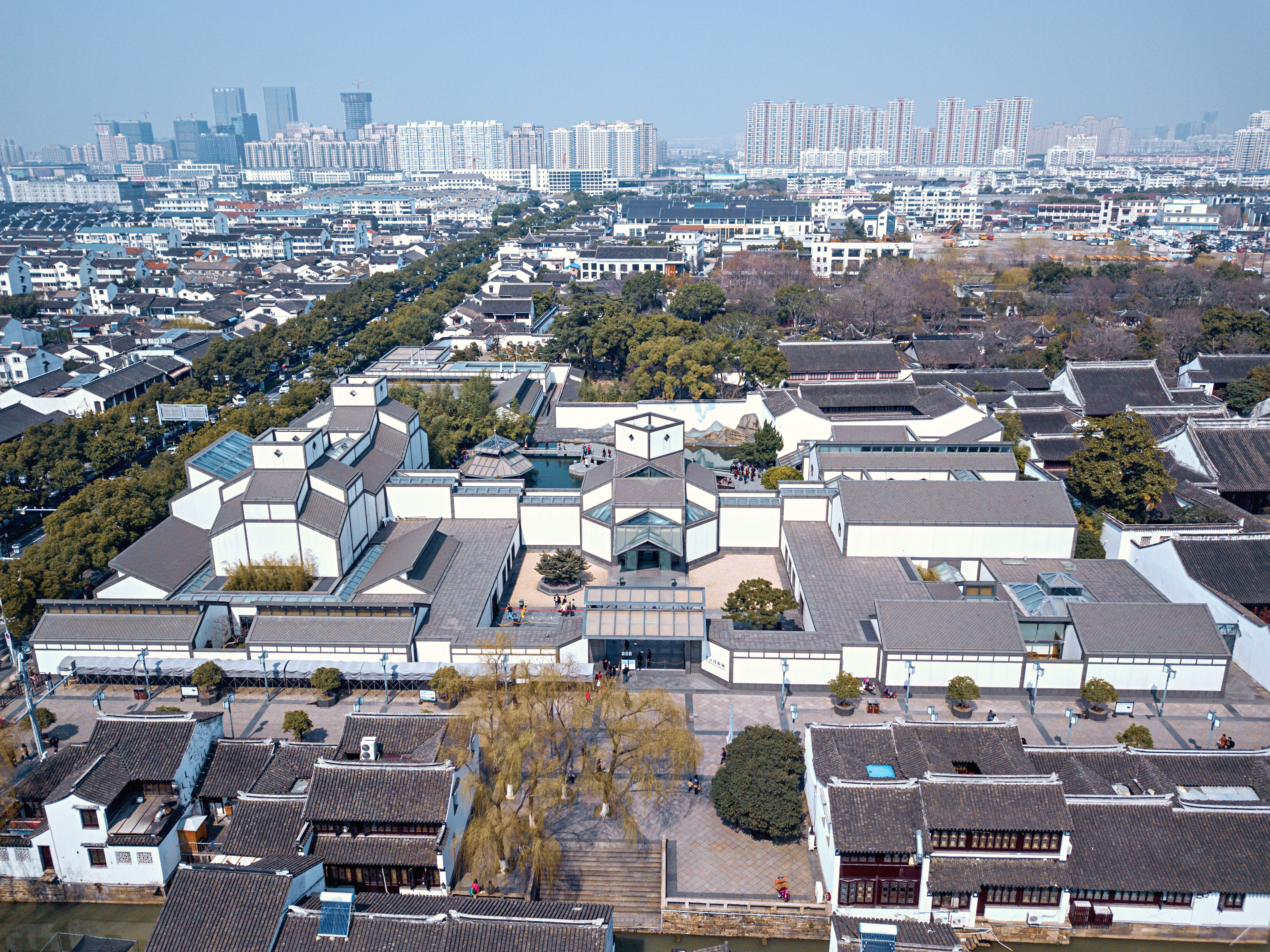 中文（中国大陆）: 苏州博物馆正面